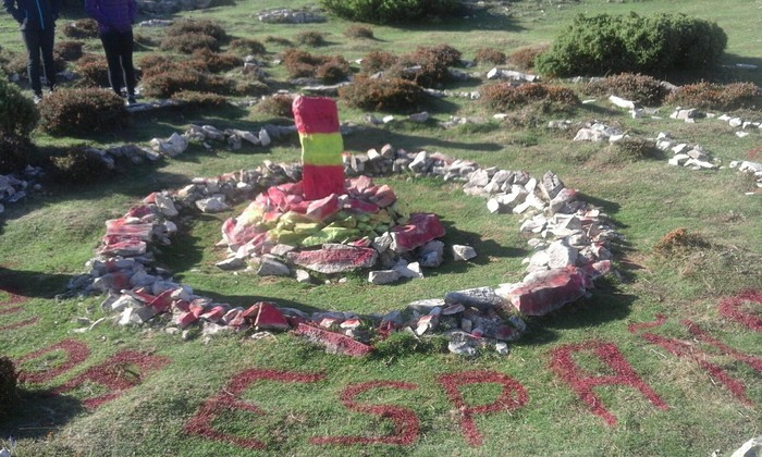 2016 EHko erdigunea erasotuta pintadekin